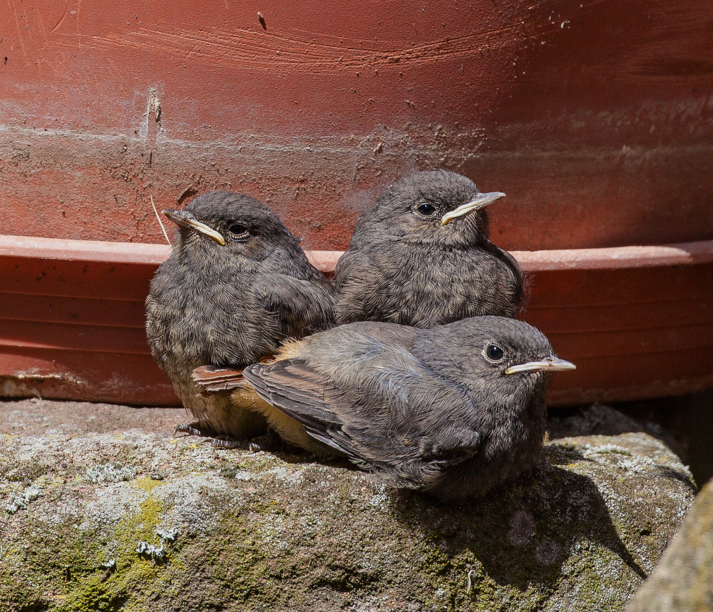 Junge Gartenrotschwänze beim ersten Ausflug, warten auf Futter